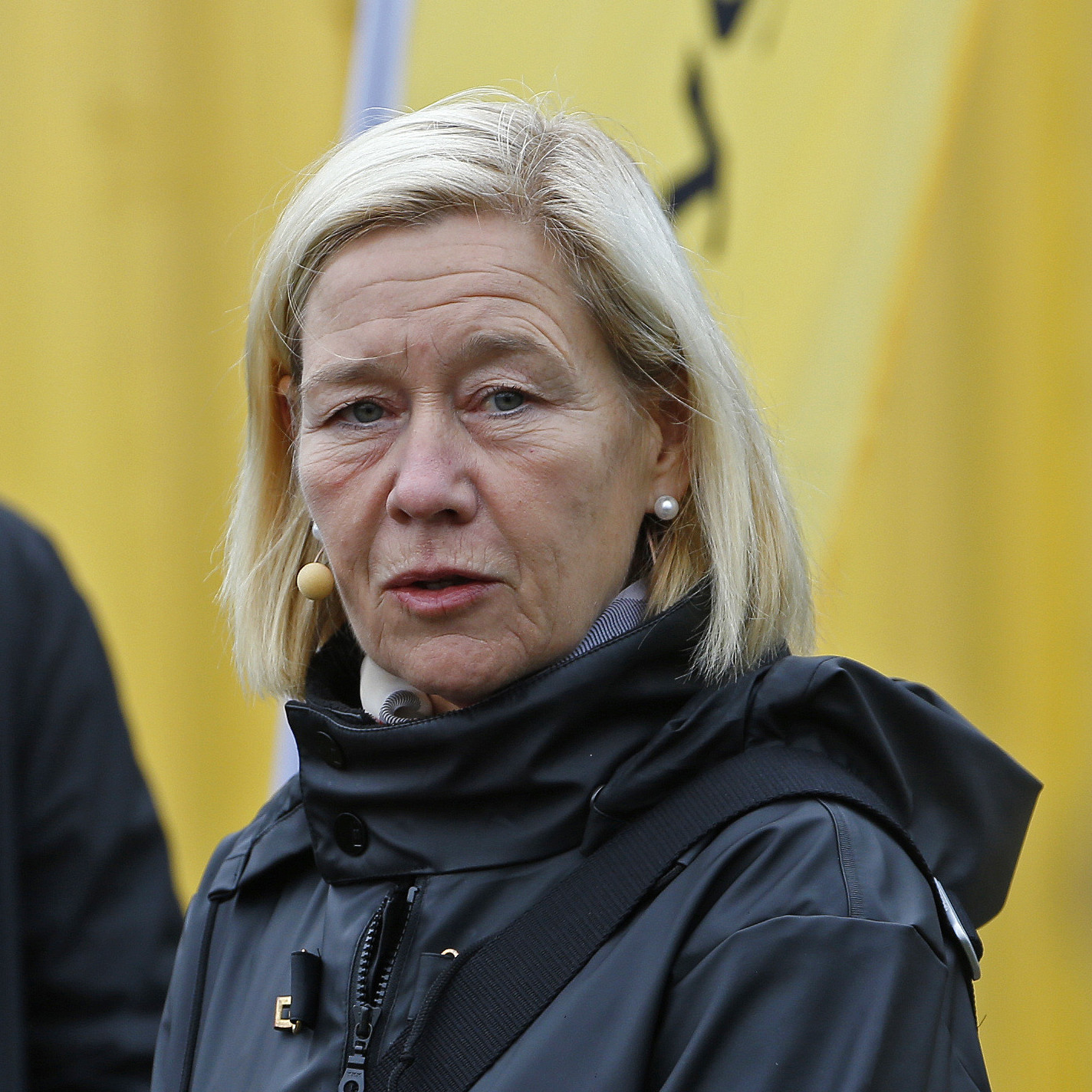 Anneli Hulthén talar vid första betonggjutningen av saluhallen i Kvillebäcken.